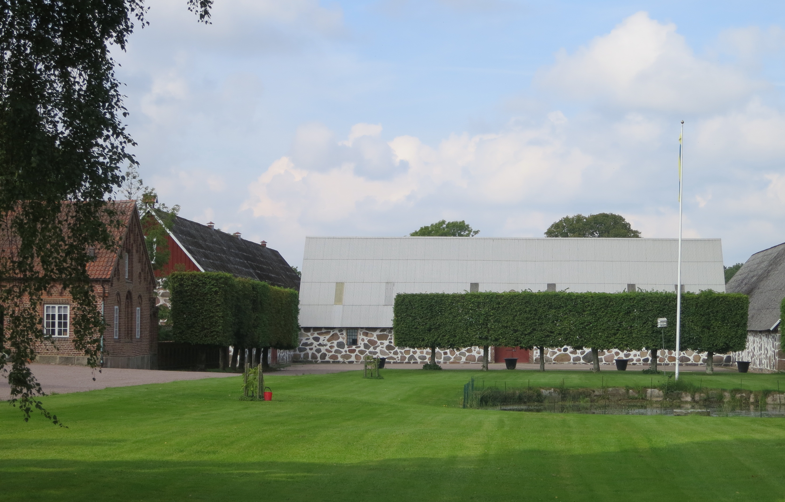 Axelvolds gård